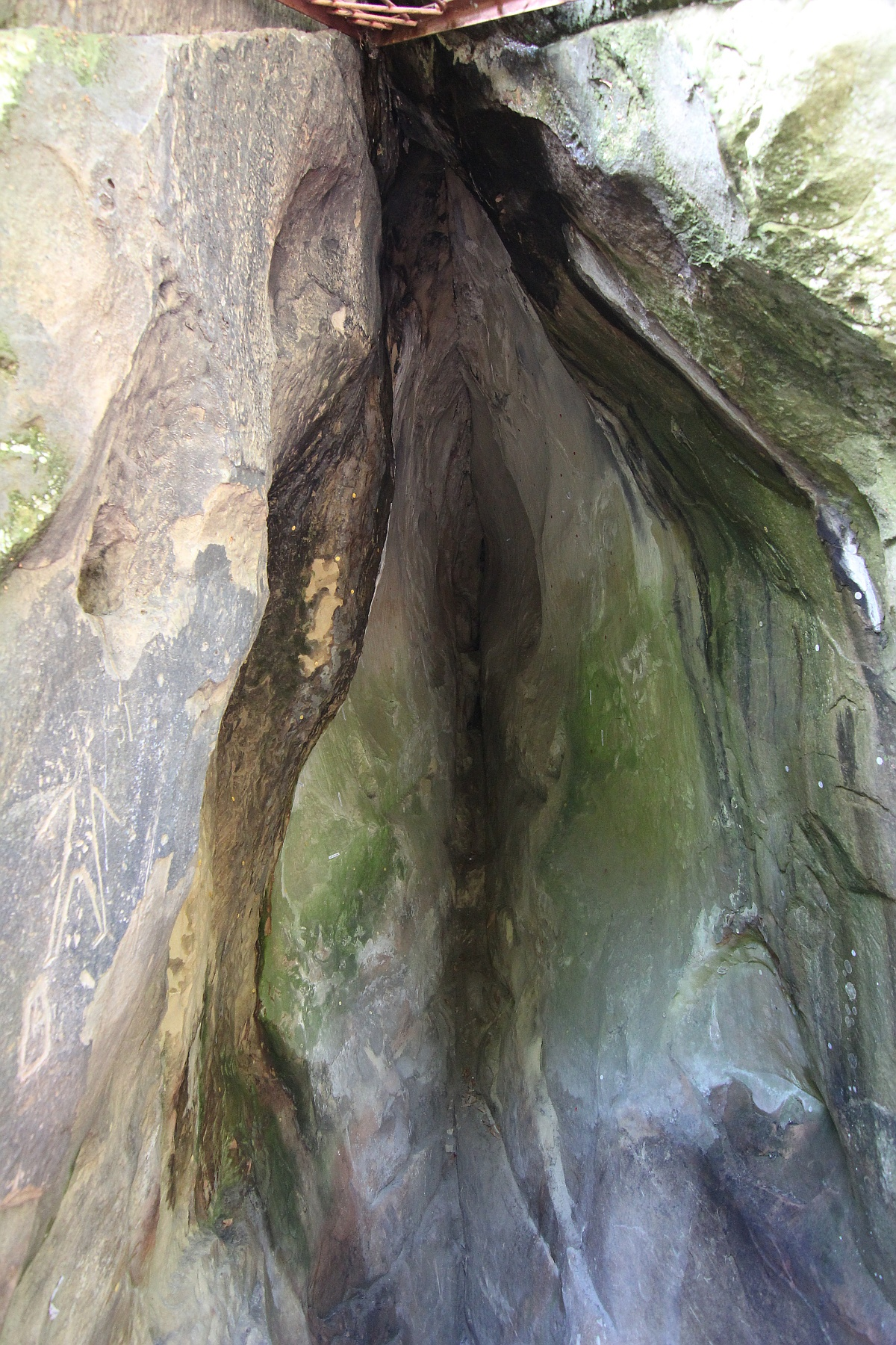 Fundul Peșterii 03